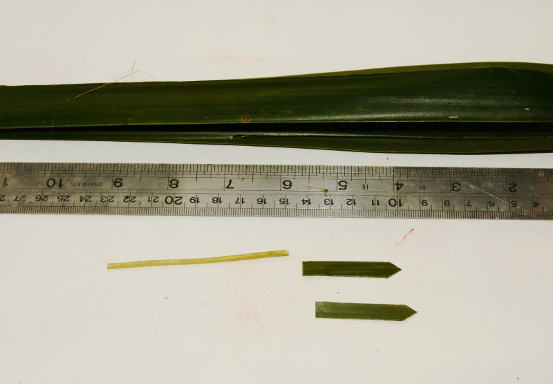 ഓലപ്പീപ്പി